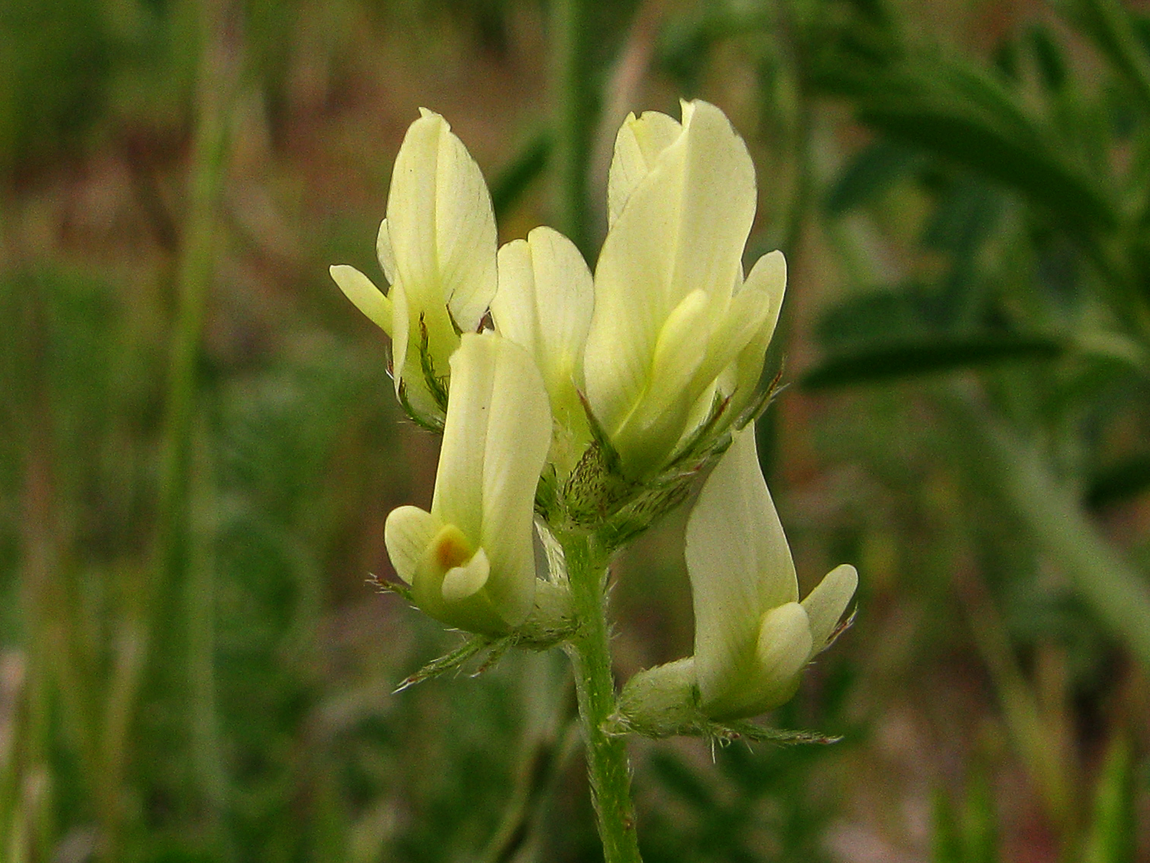 Una leguminosa bastante común, que prefiere campos de secano muy soleados. Tanto el nombre común -anzuelo-, como el nombre científico (el término "hamosus" viene del latín, y significa garfio o gancho) hacen referencia a la especial forma de sus frutos, que hacen de esta una planta prácticamente inconfundible